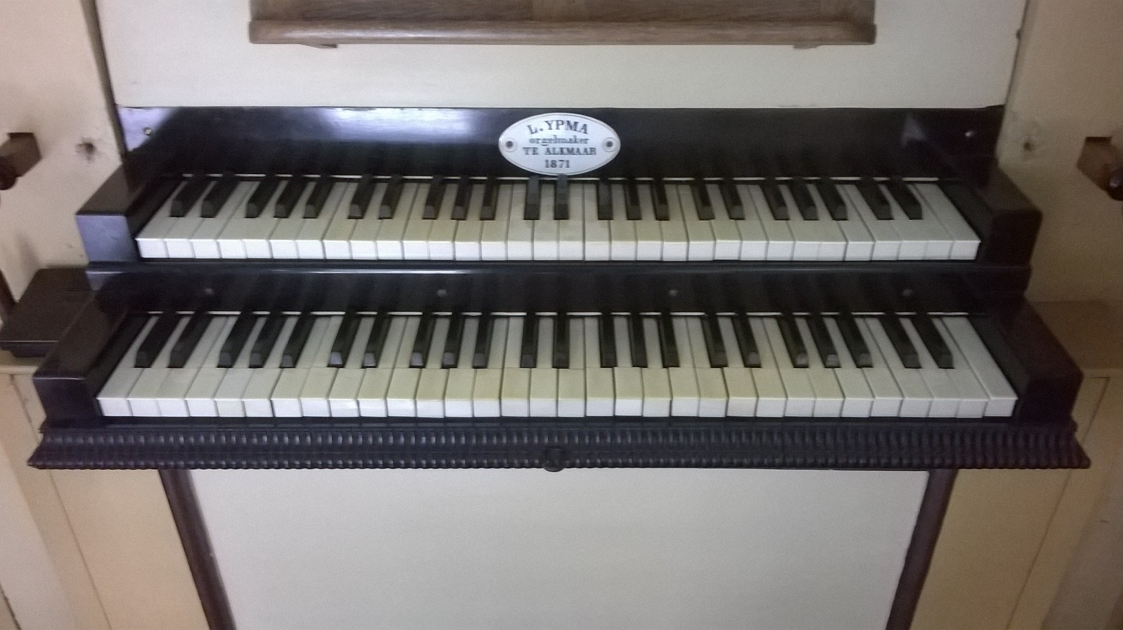 Klavieren van het kerkorgel van Westerblokker. Op het porceleinen plaatje in het midden staat L. Ypma, orgelmaker te Alkmaar 1871